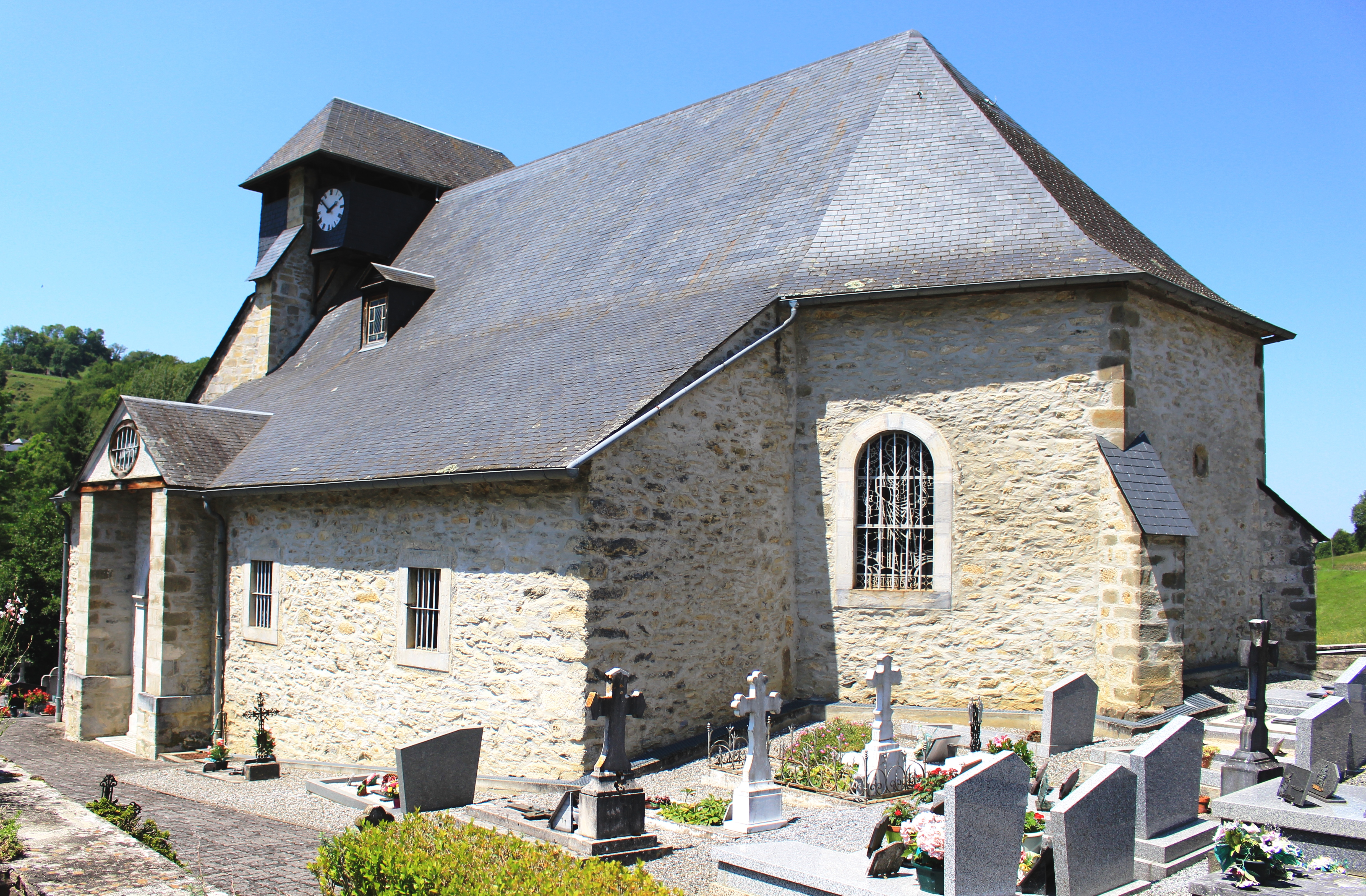 Église Saint-Pierre d'Asque (Hautes-Pyrénées)